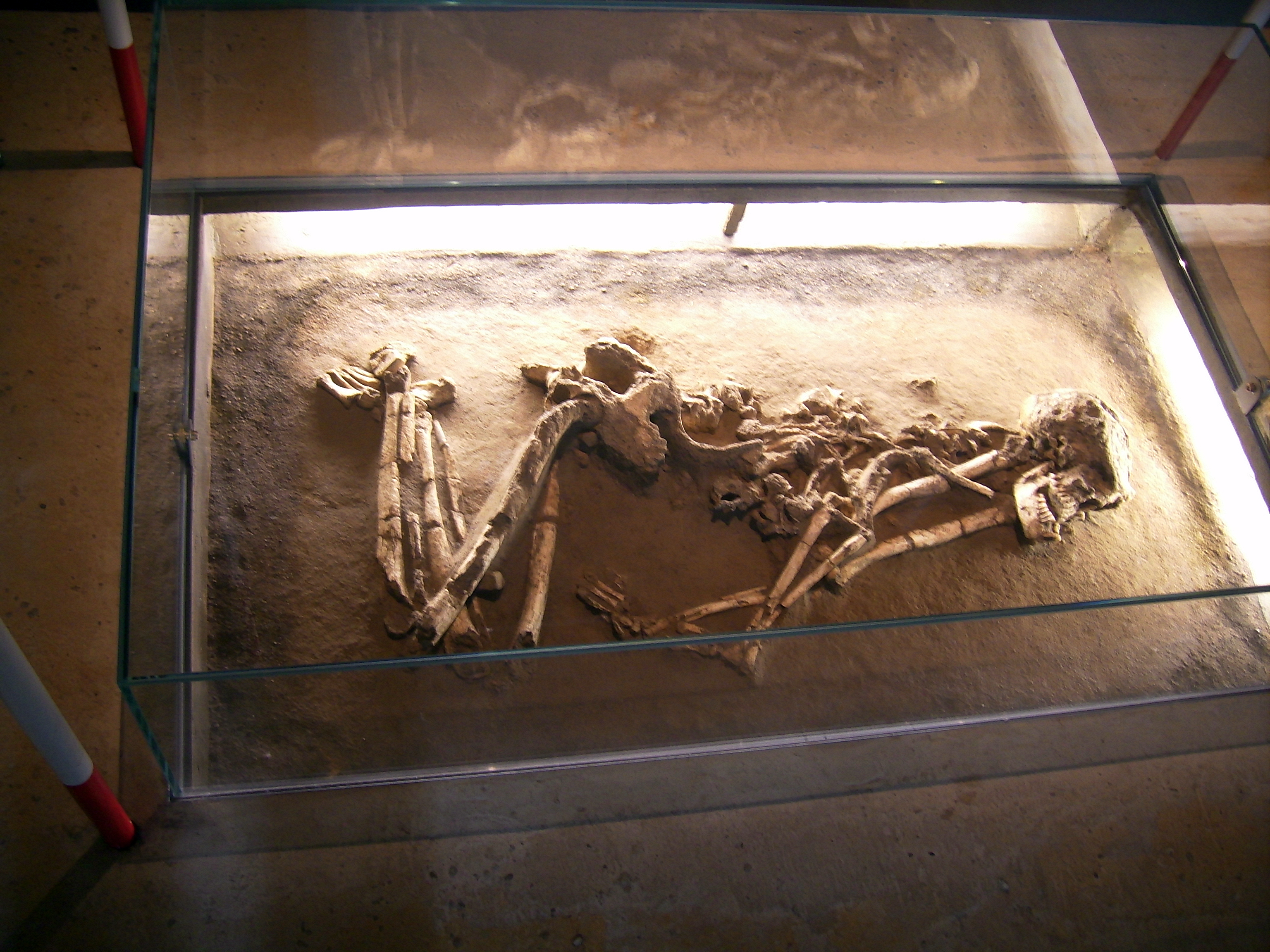 LWL-Museum für Archäologie Tote Bäuerin; 5300 - 4800 v.Chr.; Fundort: Willebadsassen-Löwen